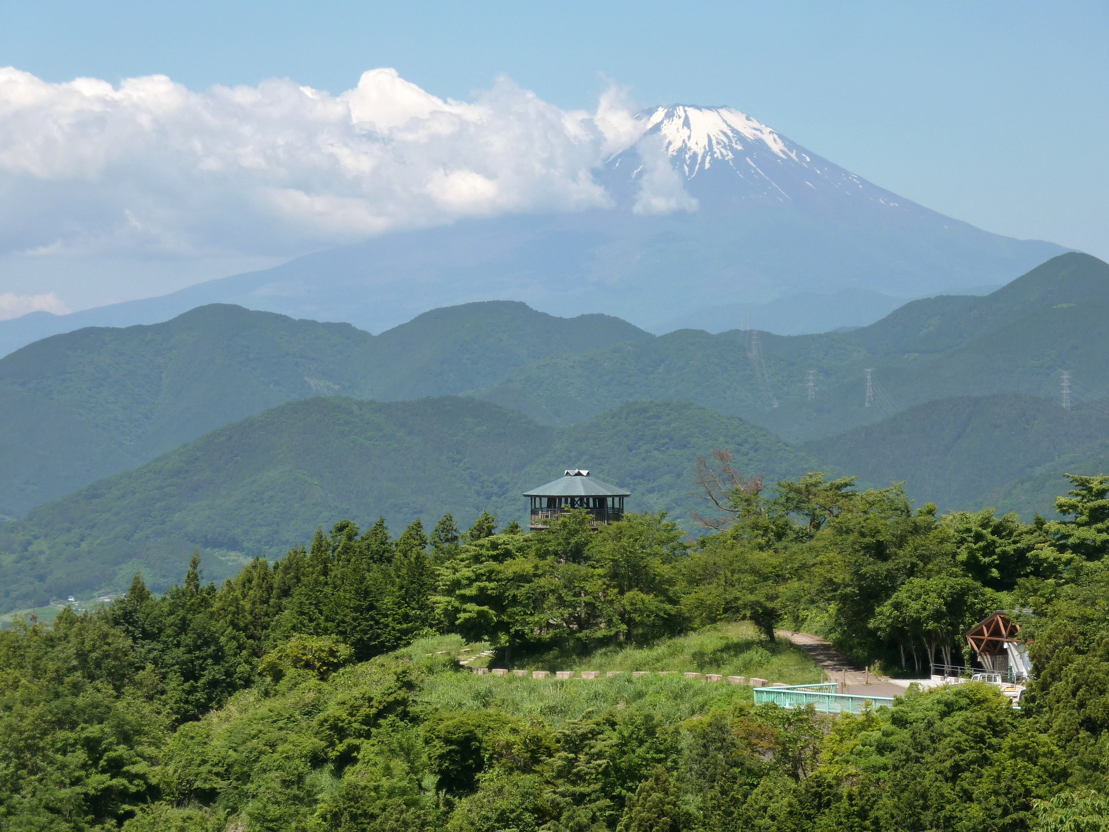 神奈川県道70号秦野清川線から見た菜の花台と富士山(神奈川県秦野市)。ヤビツ峠。